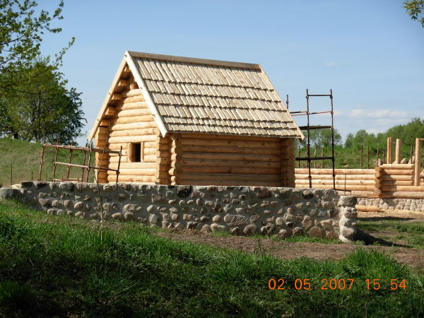 Budowa Rezerwatu archeologicznego na Zawodziu w Kaliszu